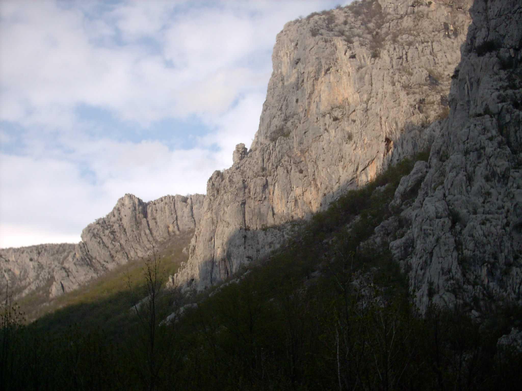 Süd-Velebit, Nahe Starigrad Paklenica, Kroatien